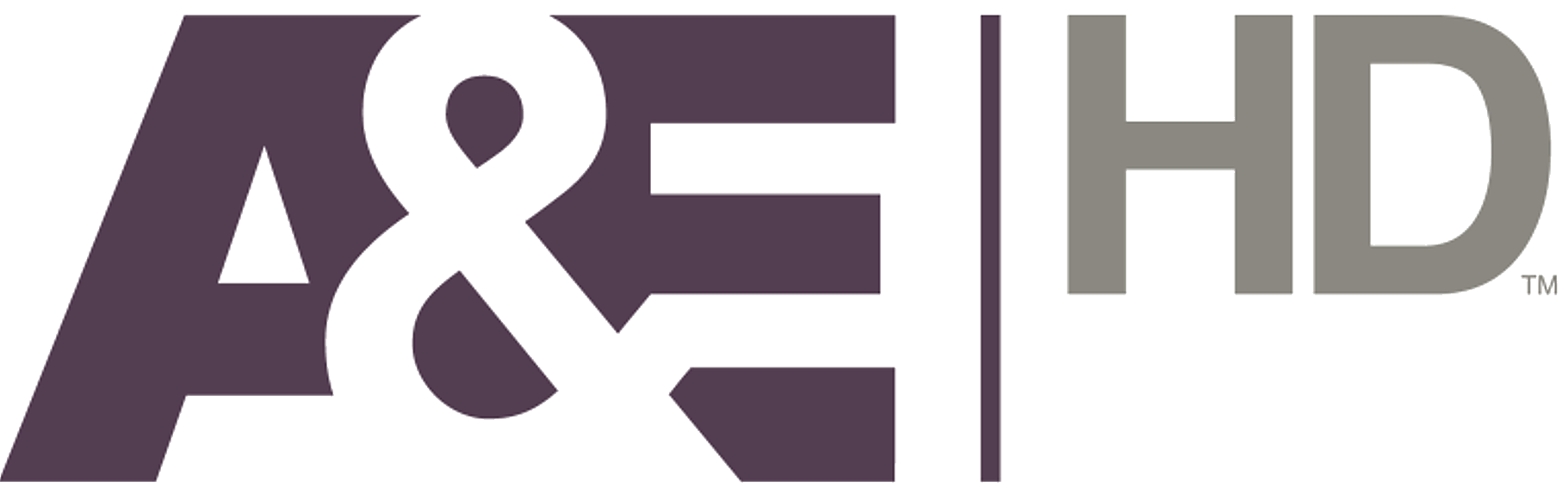 Logo von A&E Germany HD - ab 22. September 2014